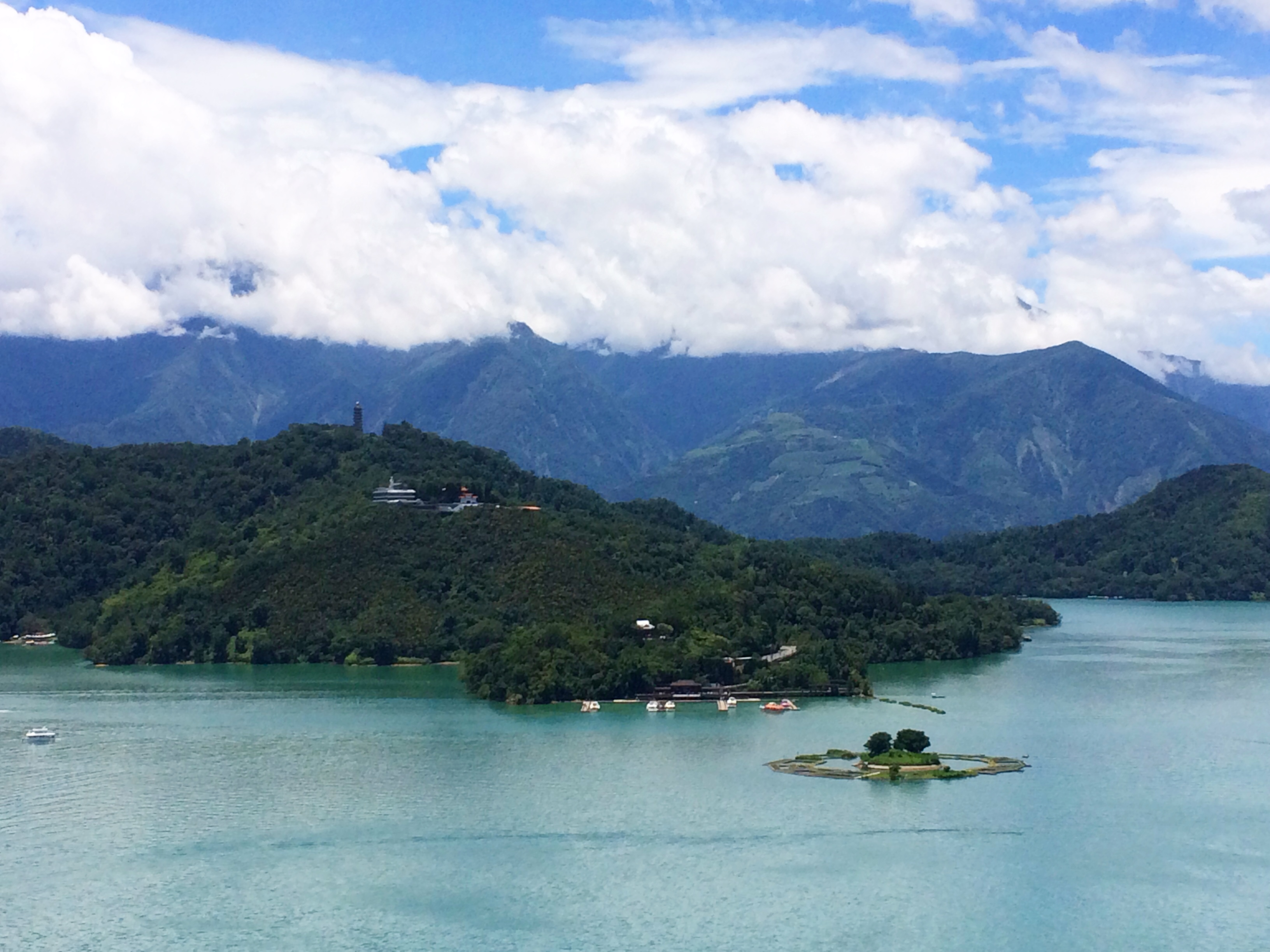 中文（台灣）: 傳說中，邵族祖先為了追逐一隻白色水鹿，來到日月潭，從此邵族祖先在日月潭拉魯島定居，拉魯島也就成為祖靈安息的聖地。